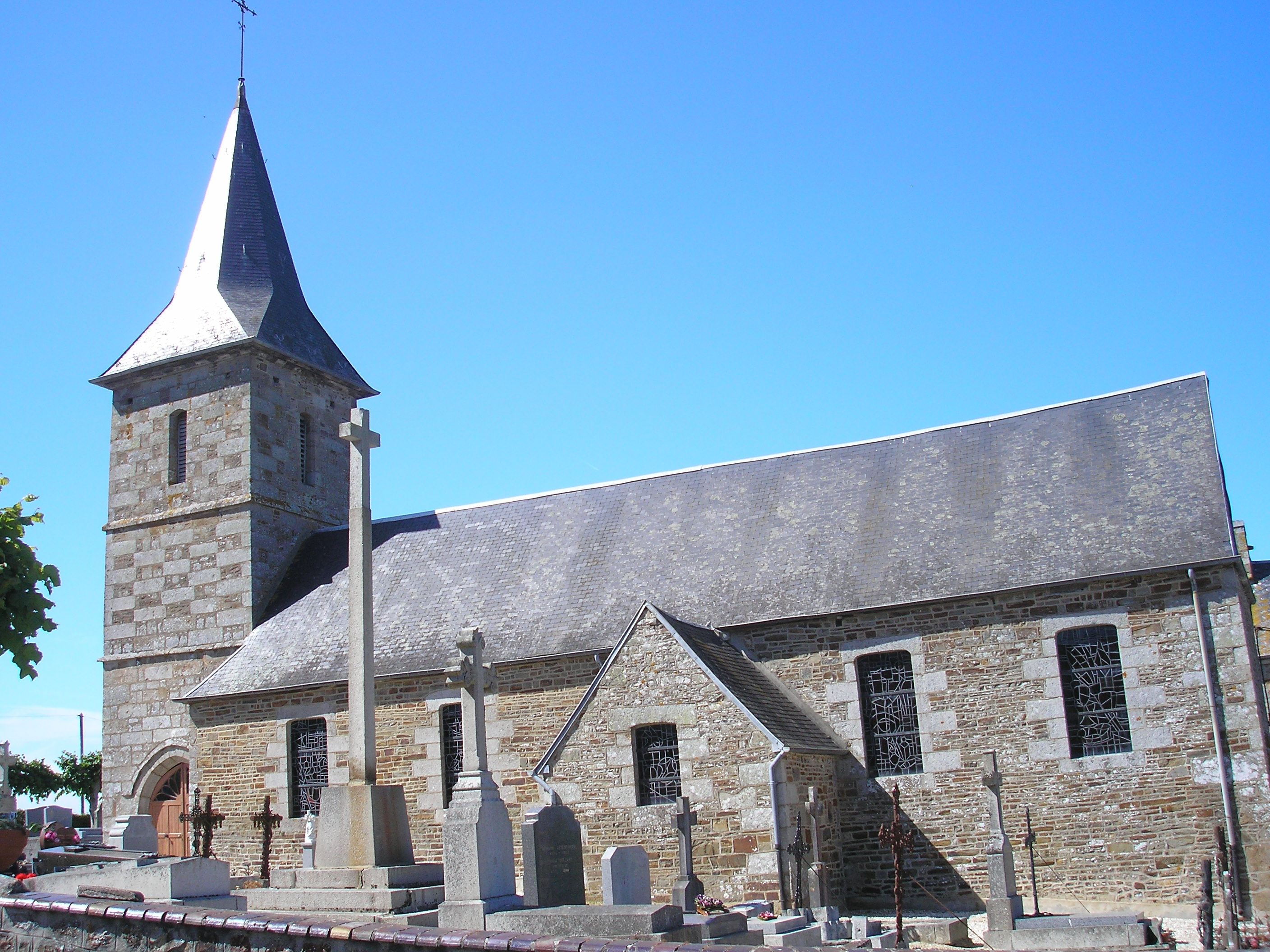 Le Mesnil-Robert (Normandie, France). L'église Saint-Pierre.